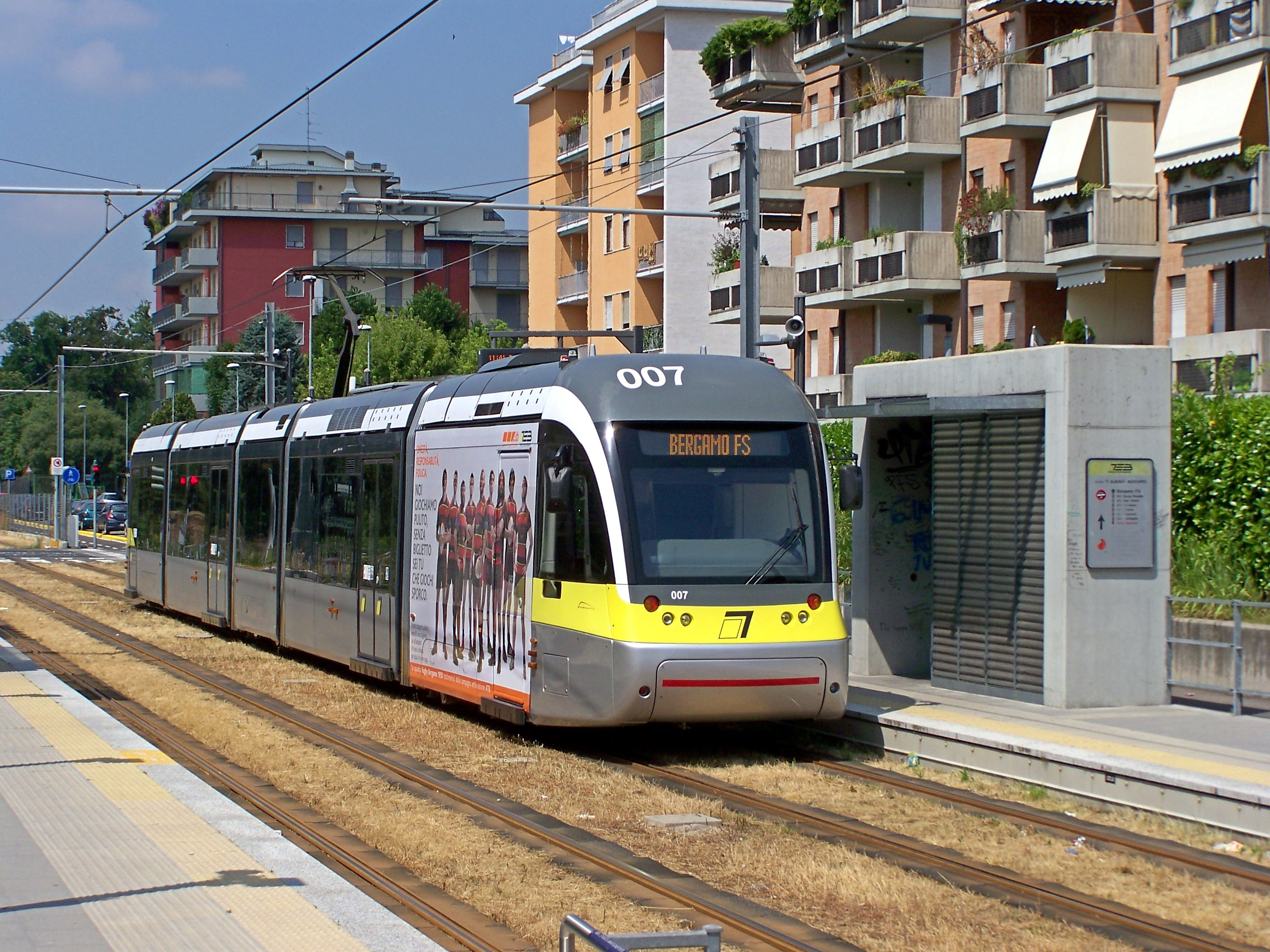 L'AnsaldoBreda Sirio TEB 007 sosta presso la fermata di Torre Boldone per partire alla volta di Bergamo FS